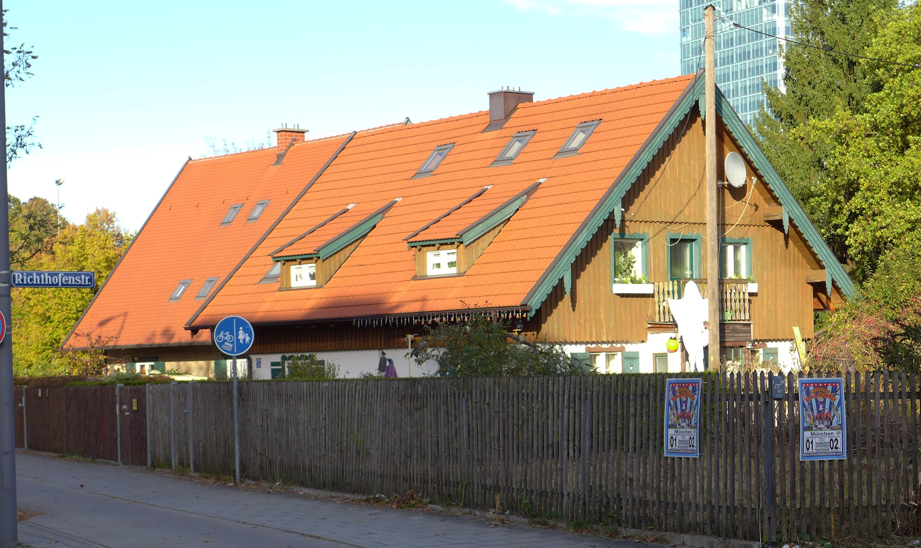 Hanauer Str 10, München